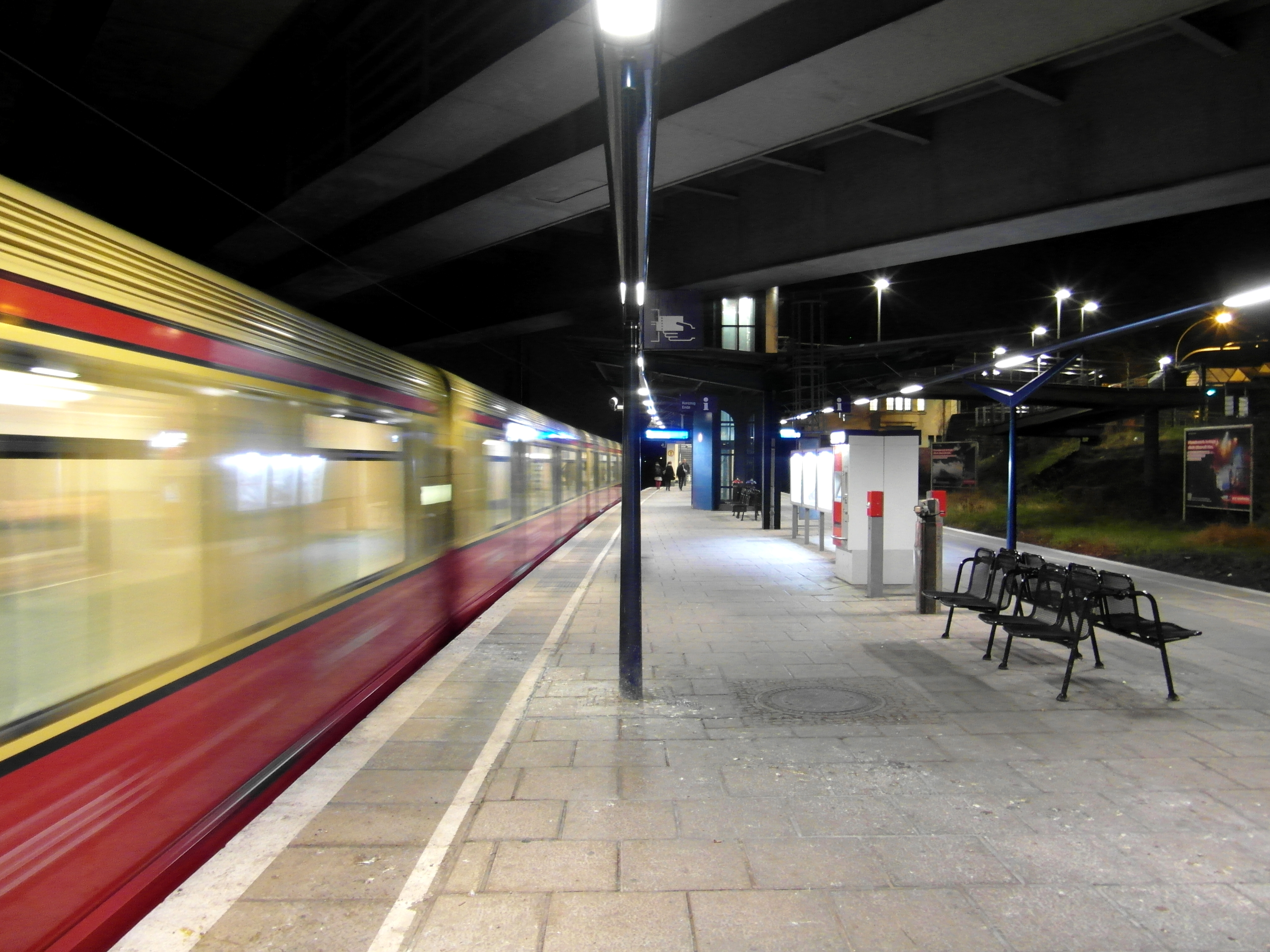 Linien S2 und S8 an der Stettiner Bahn